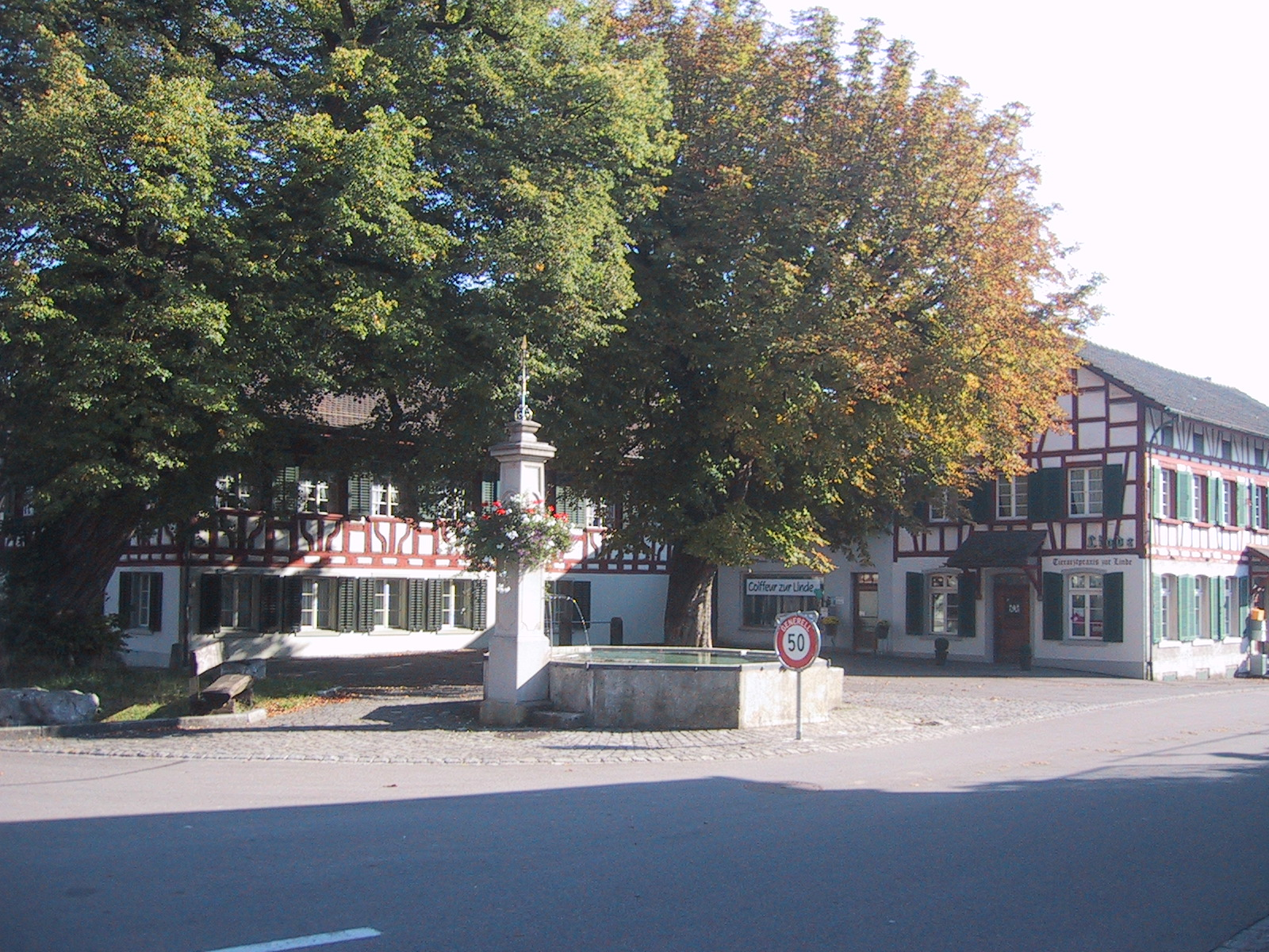 Aufnahme 24. September 2005, Oberstammheim, Dorfplatz, Kanton Zürich. Fotograf Peter Berger (selbst fotografiert). Lizenzstatus "GNU-FDL"